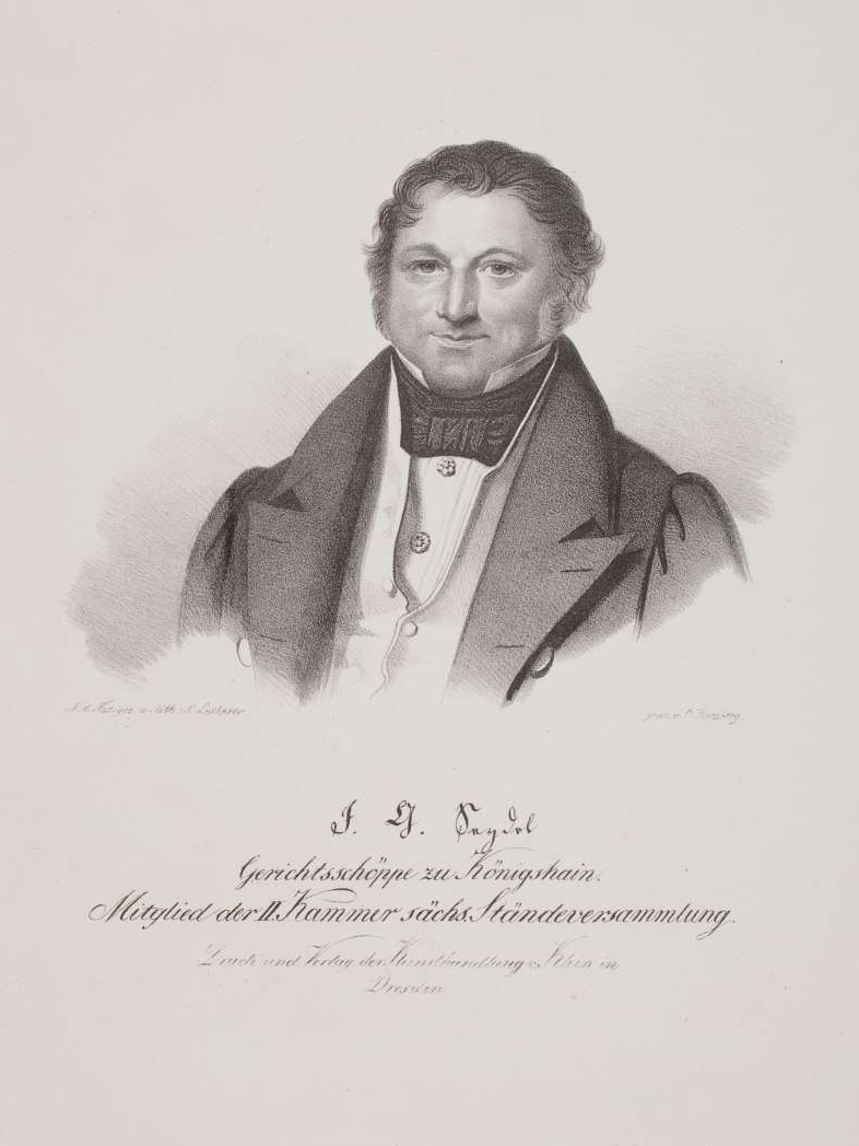 Gerichtsschöffe zu Königshain b. Mittweida (Sachsen); Abgeordneter der Zweiten Kammer der sächs. Ständeversammlung 1833/34., 1789-1854